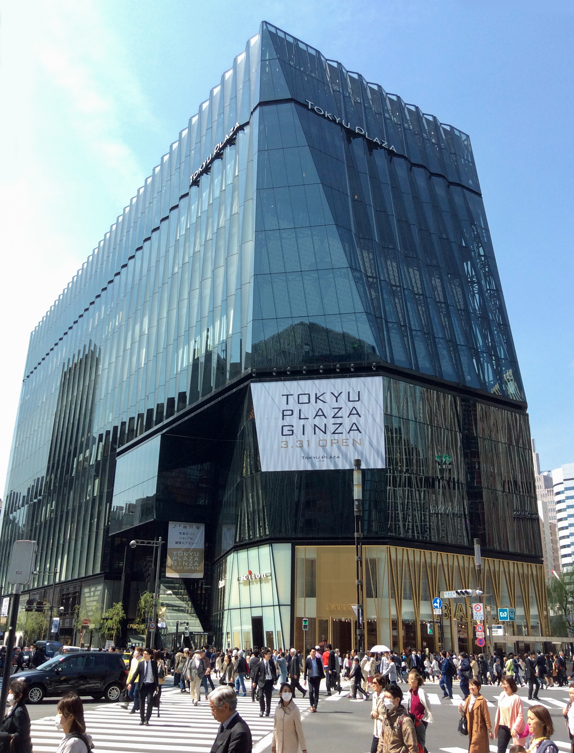 東京プラザ銀座